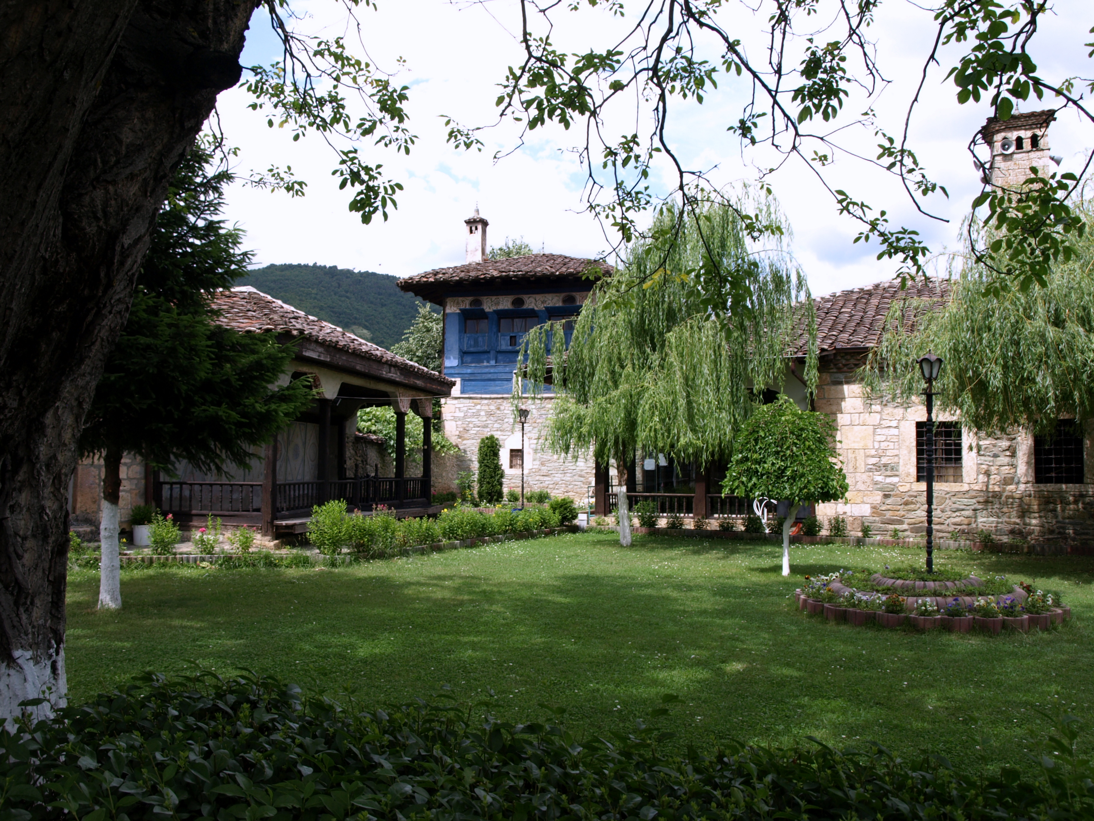 Arabati-Baba-Tekke - Derwischklosterkomplex in Tetovo